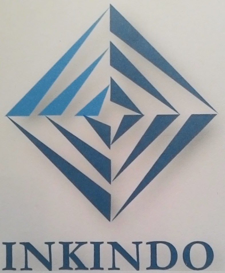 Ikatan Nasional Konsultan Indonesia (INKINDO)